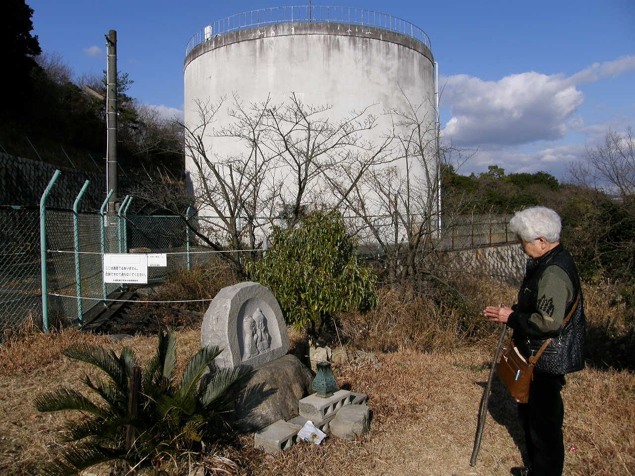 道祖神が祀られたタンク山に参拝する地元の老婆